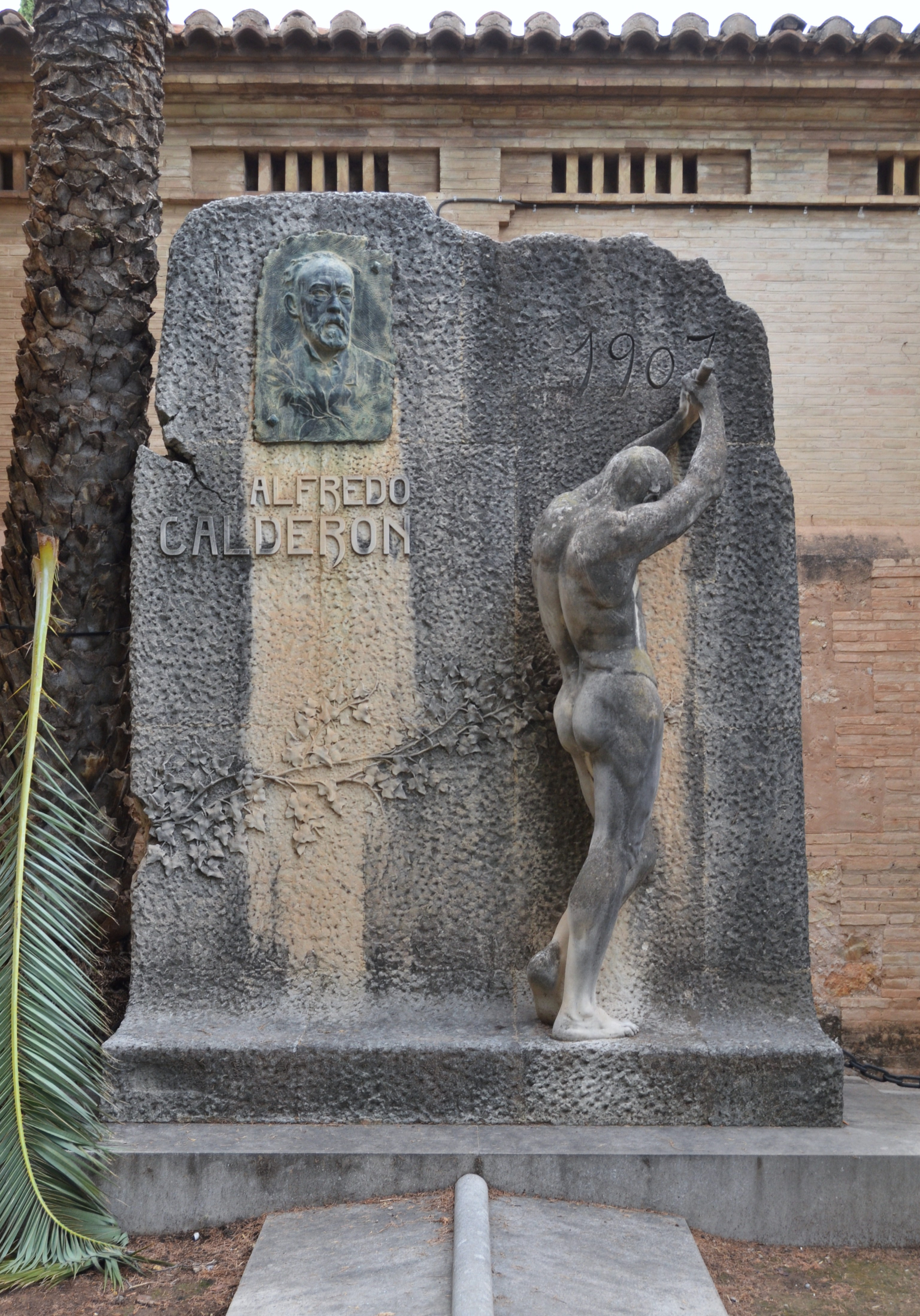 Tomba d'Alfredo Calderón, cementeri general de València.